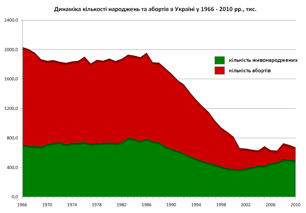 Загальна кількість народжень і абортів в Україні/УРСР у 1960 - 2010 рр.